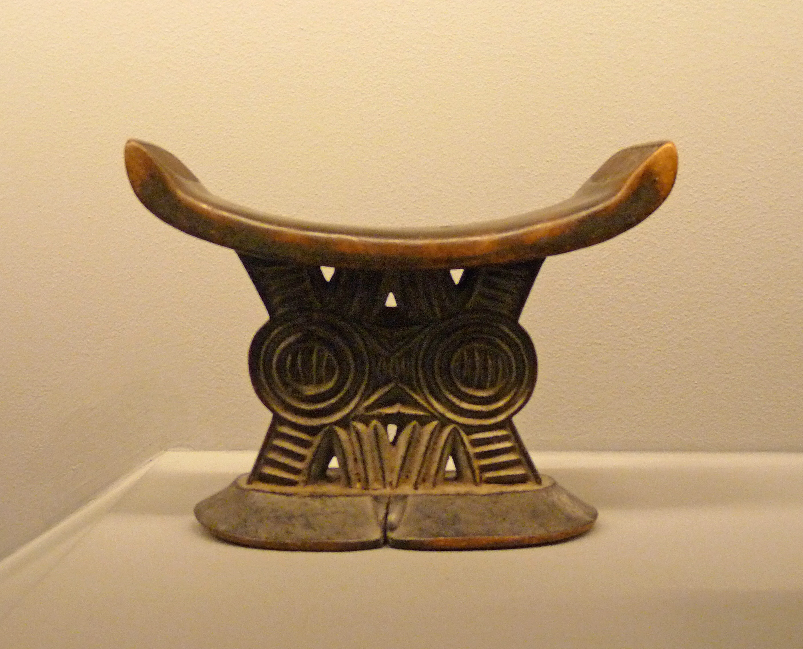 Shona : appuie-tête. Zimbabwe. 19e s. Bois. Musée du quai Branly